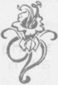 Osmanlı Ahrar Fırkası'nın amblemi.